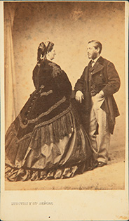 Fotografía tipo carte de visite realizada en el gabinte de Catherine Esperon y su esposo. Está firmada con el nombre comercial de la pareja: "Ludovisi y su señora"